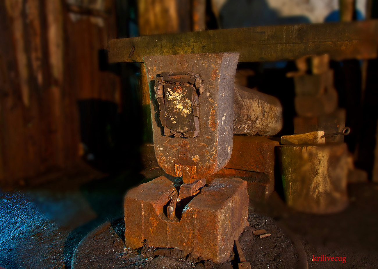 Молот кузні Гамора в селі Лисичево